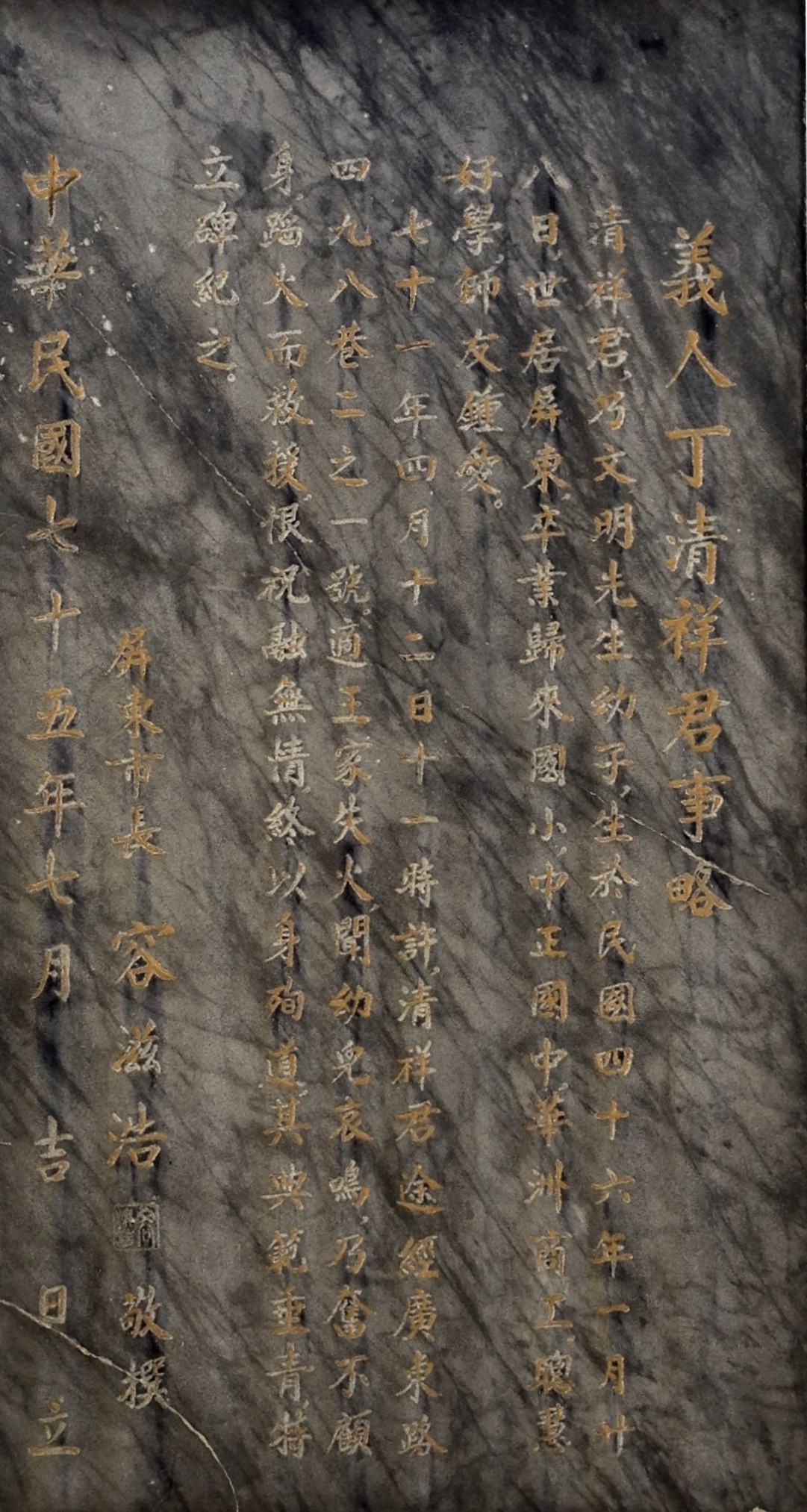 丁清祥銅像座角落〈義人丁清祥君事略〉，中華民國75年7月立，屏東市市長容滋浩撰，刻有丁清祥生年、籍貫、學歷等資訊。